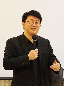 中州科技大學董事長柴御清。